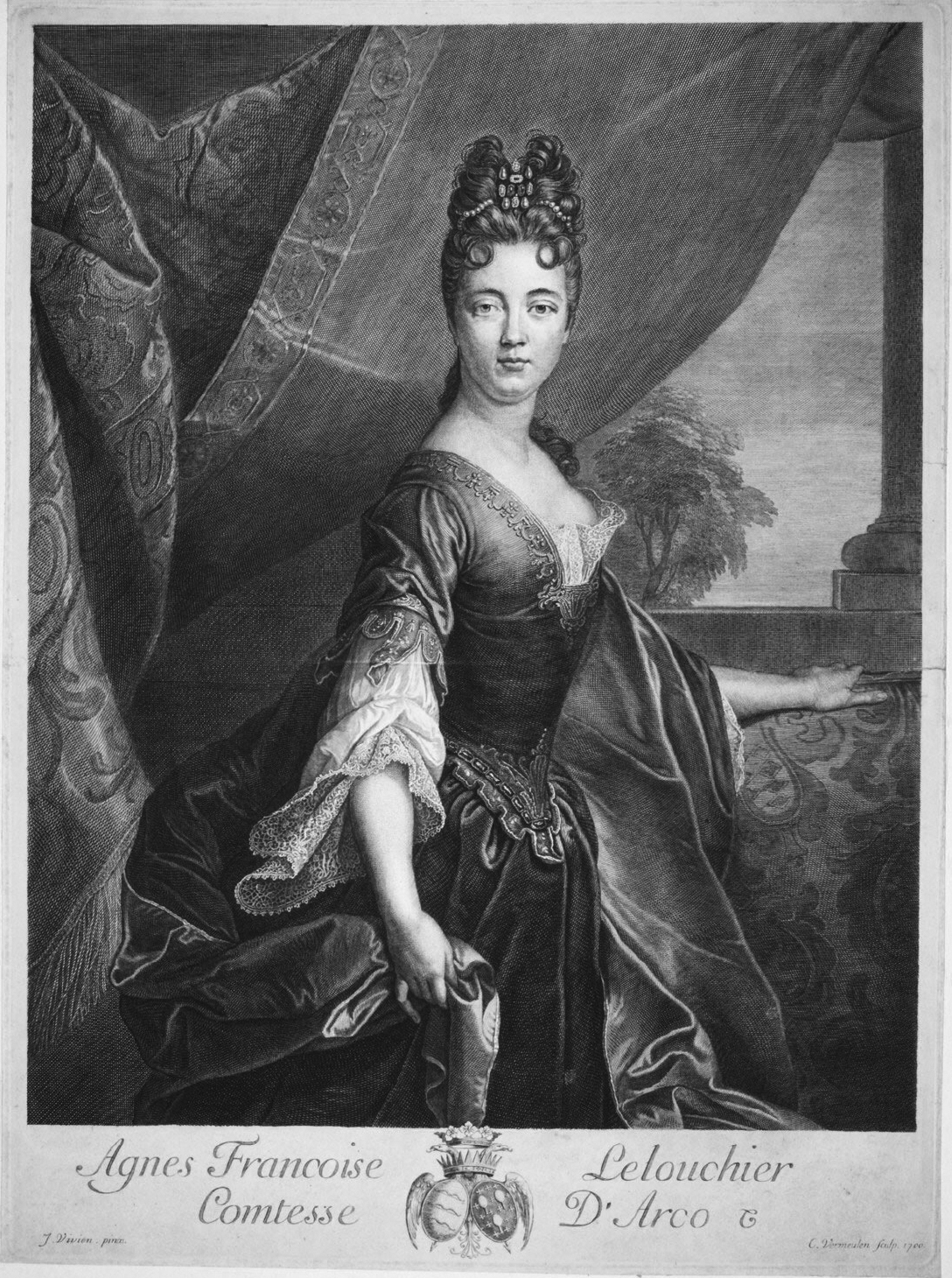 Portrait of Agnès-Françoise Lelouchier, comtesse d'Arco